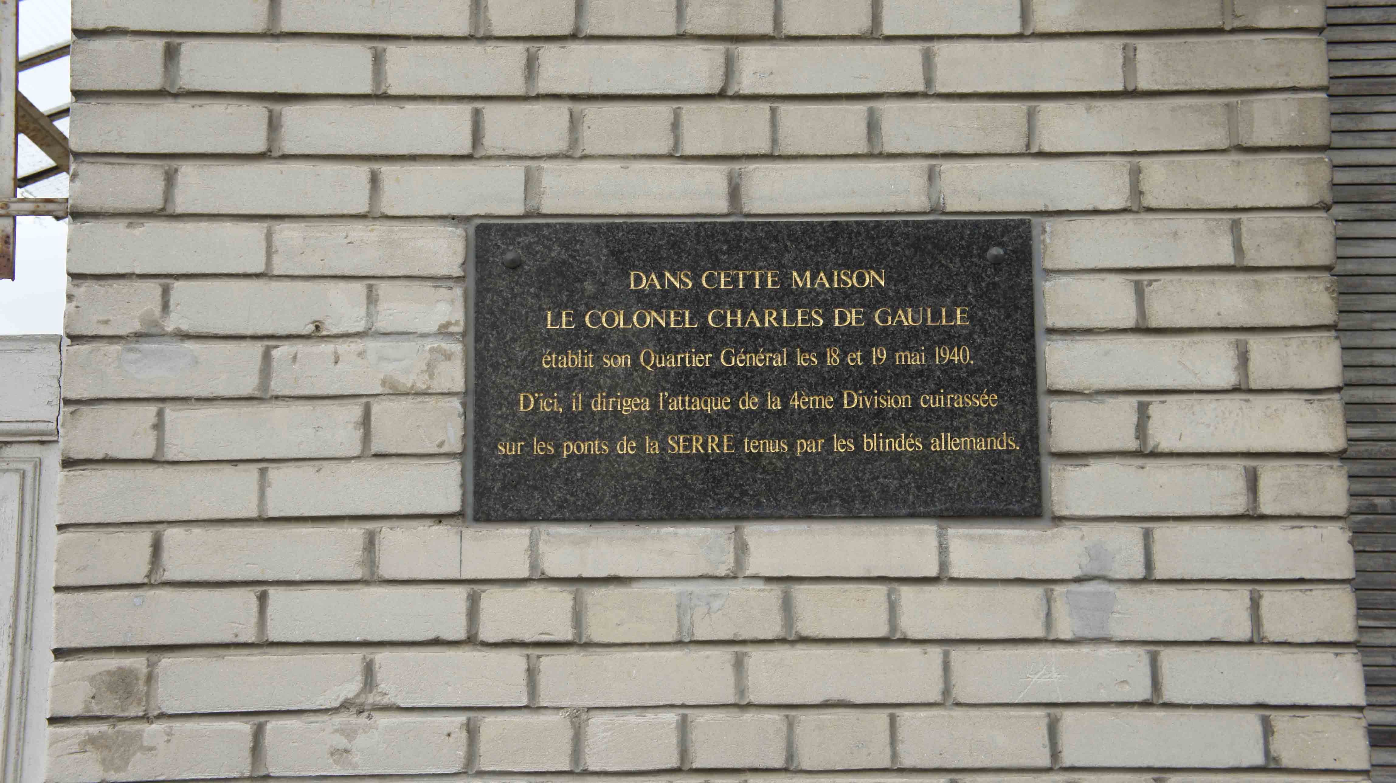 Plaque commémorative du colonel de Gaulle ayant établit là le 18 mai 1940 el QG de la 4e div cuirrasée.